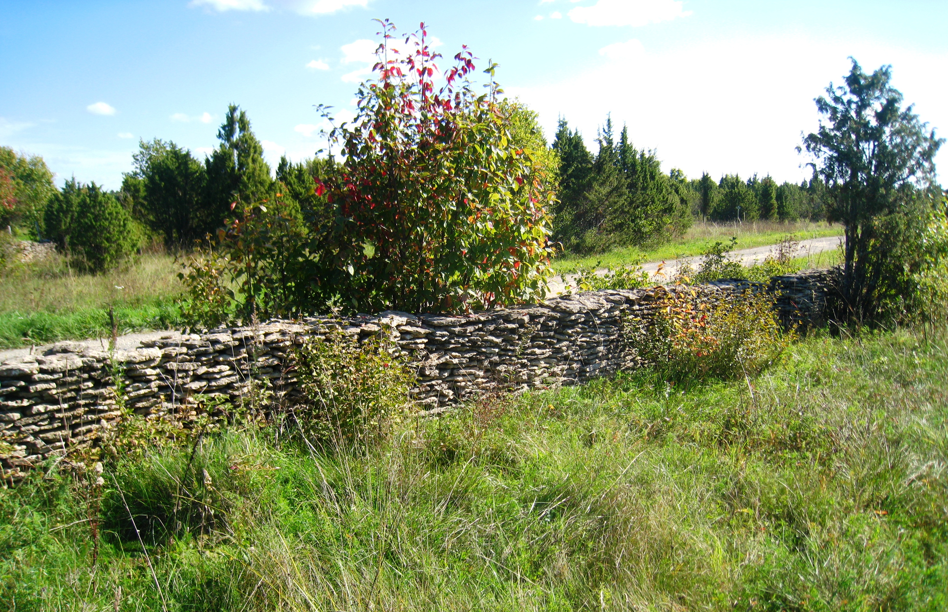 Kiviaed.